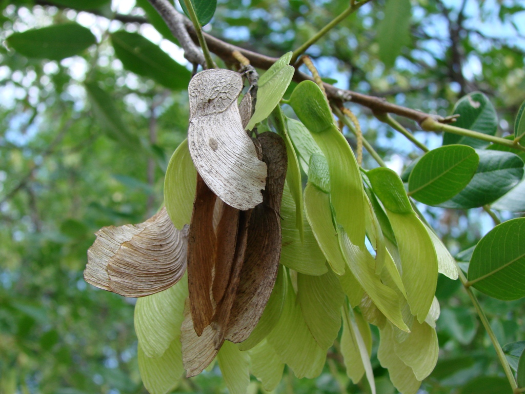 Pterogyne nitens Tul. - FABACEAE - Campus da Universidade de Brasília - Distrito Federal - Brasil.